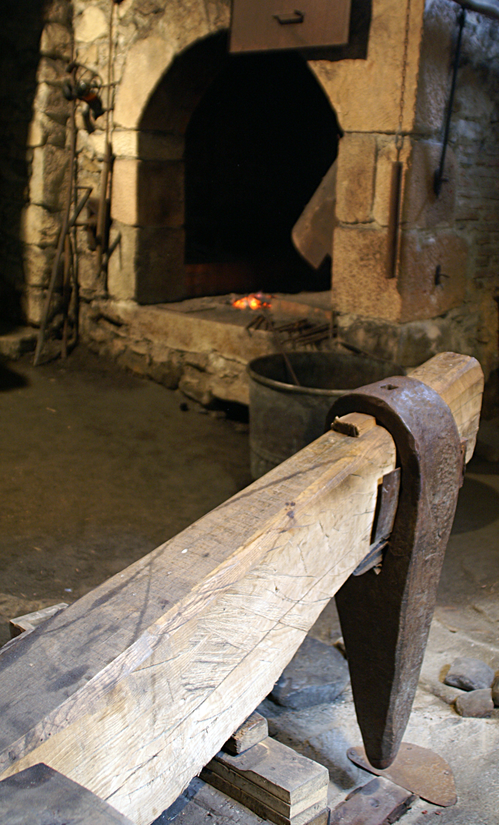 Le marteau servant à battre le cuivre, et en arrière plan, la forge. La Bastide-l'Évêque (Aveyron)